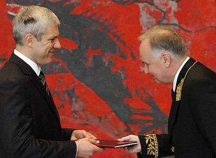 Александр Васильевич Конузин и Борис Тадич